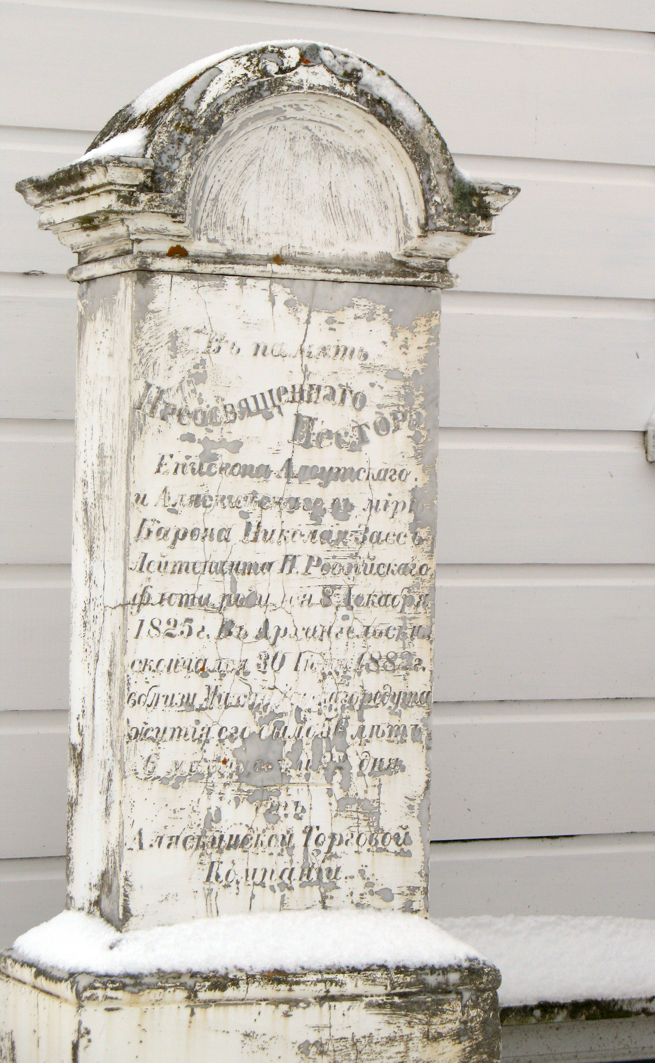 Памятник с надписью на русском, Западные Алеутские острова